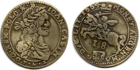 Орт ВКЛ 1664 года